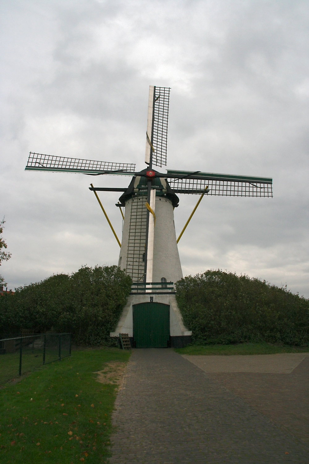 Halseteren: molen Sint-Antonius